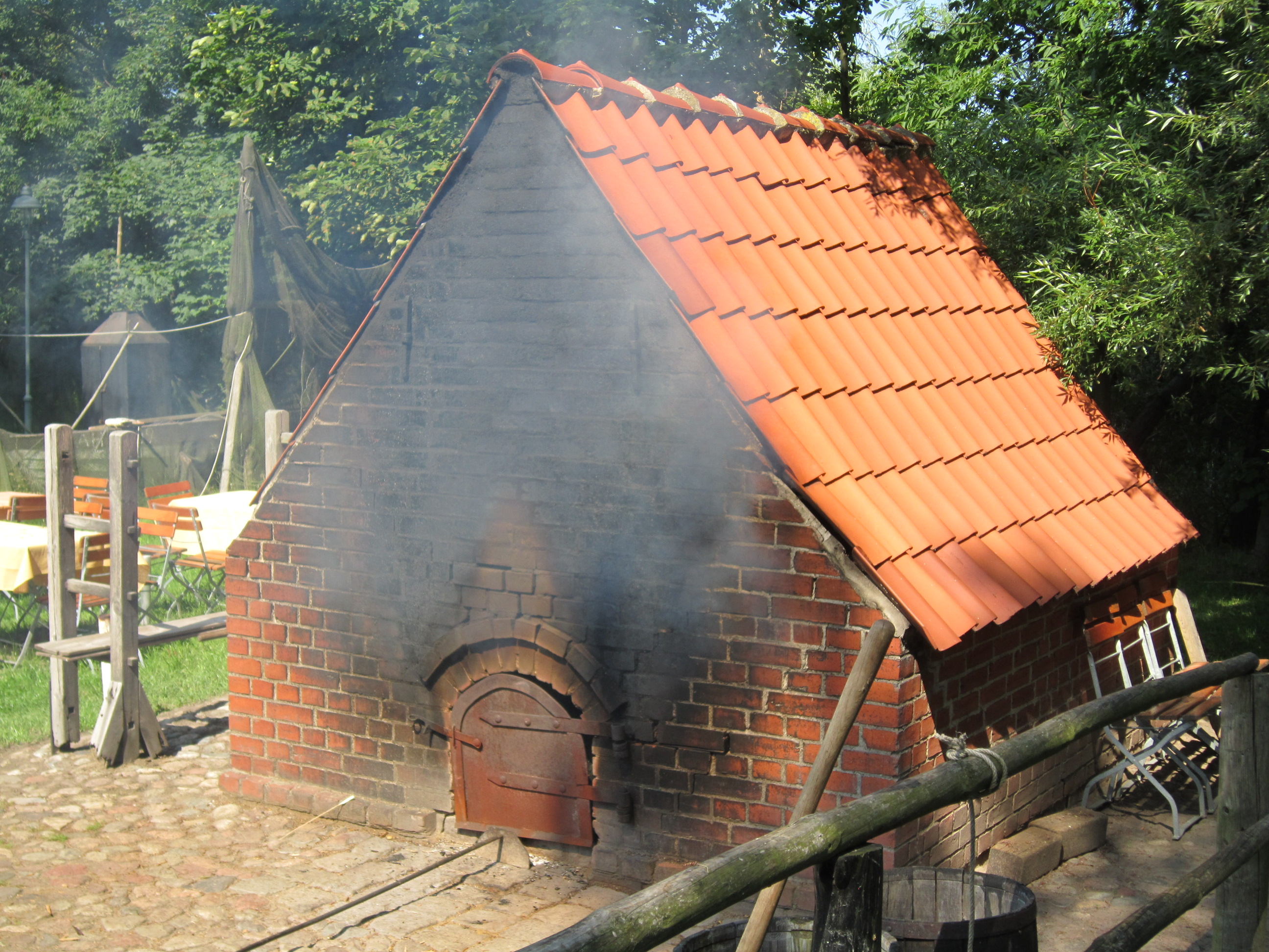 Backofen im Freilichtmuseum Klockenhagen (Stadt Ribnitz-Damgarten im Landkreis Nordvorpommern)